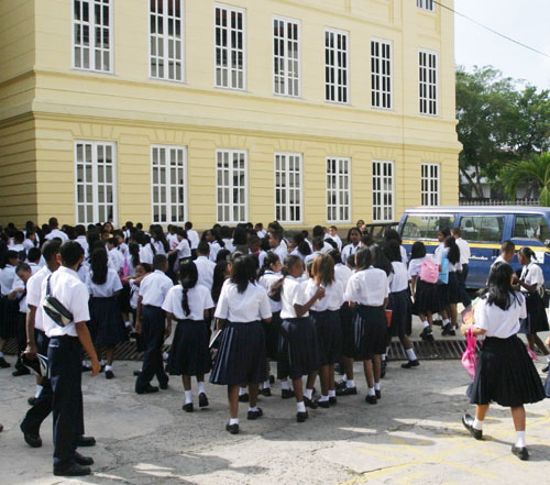 Insituto Nacional Panamá